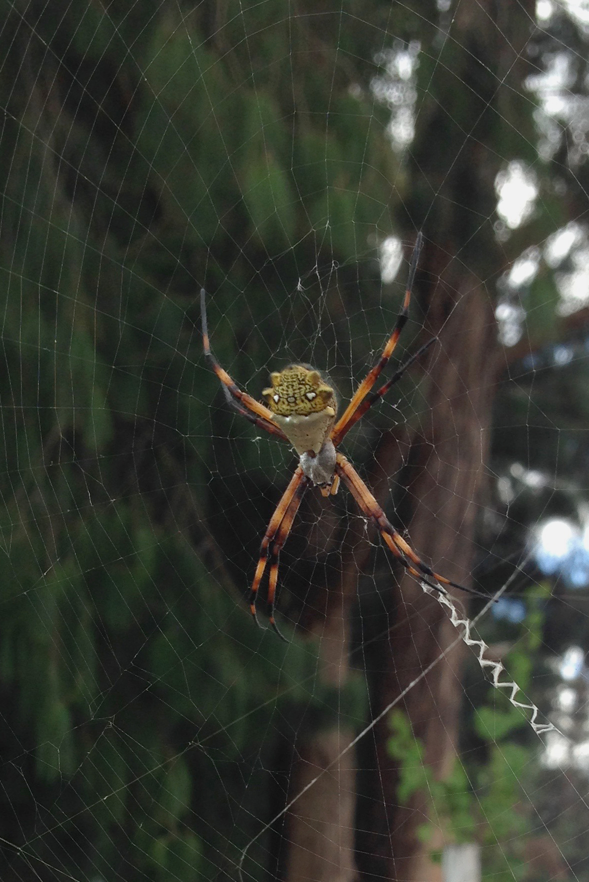 Varieté argentata, los Andes - Equateur